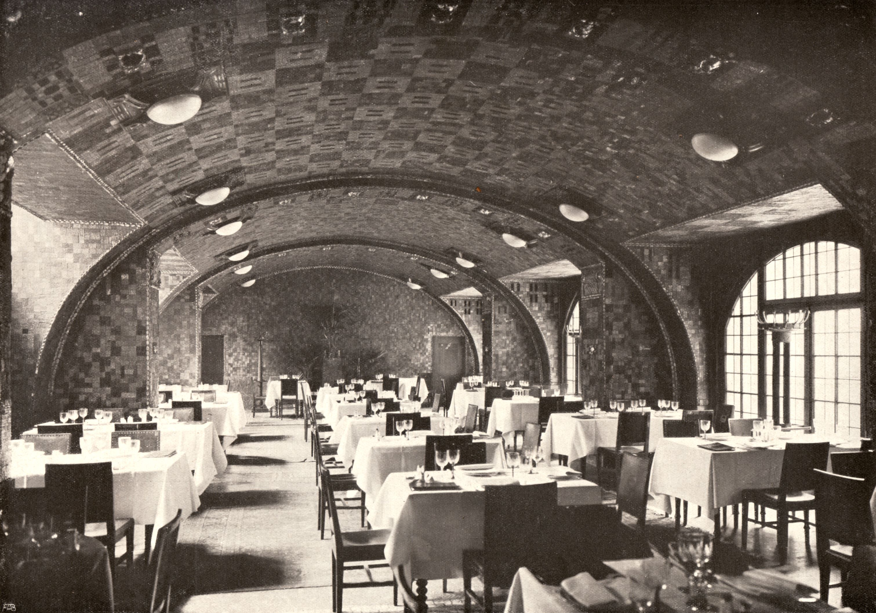 Berlin - Weinhaus Rheingold, Ansicht des Muschelsaals